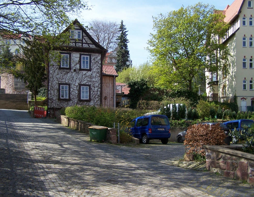 Am Pfarrberg befand sich das mittelalterliche Siechenhaus "Heiligenhaus". An seiner Stelle (Pfarrberg 6) befindet sich bereits seit Jahrzehnten eine Lücke in der Straße die man heute als Parkplatz nutzt.